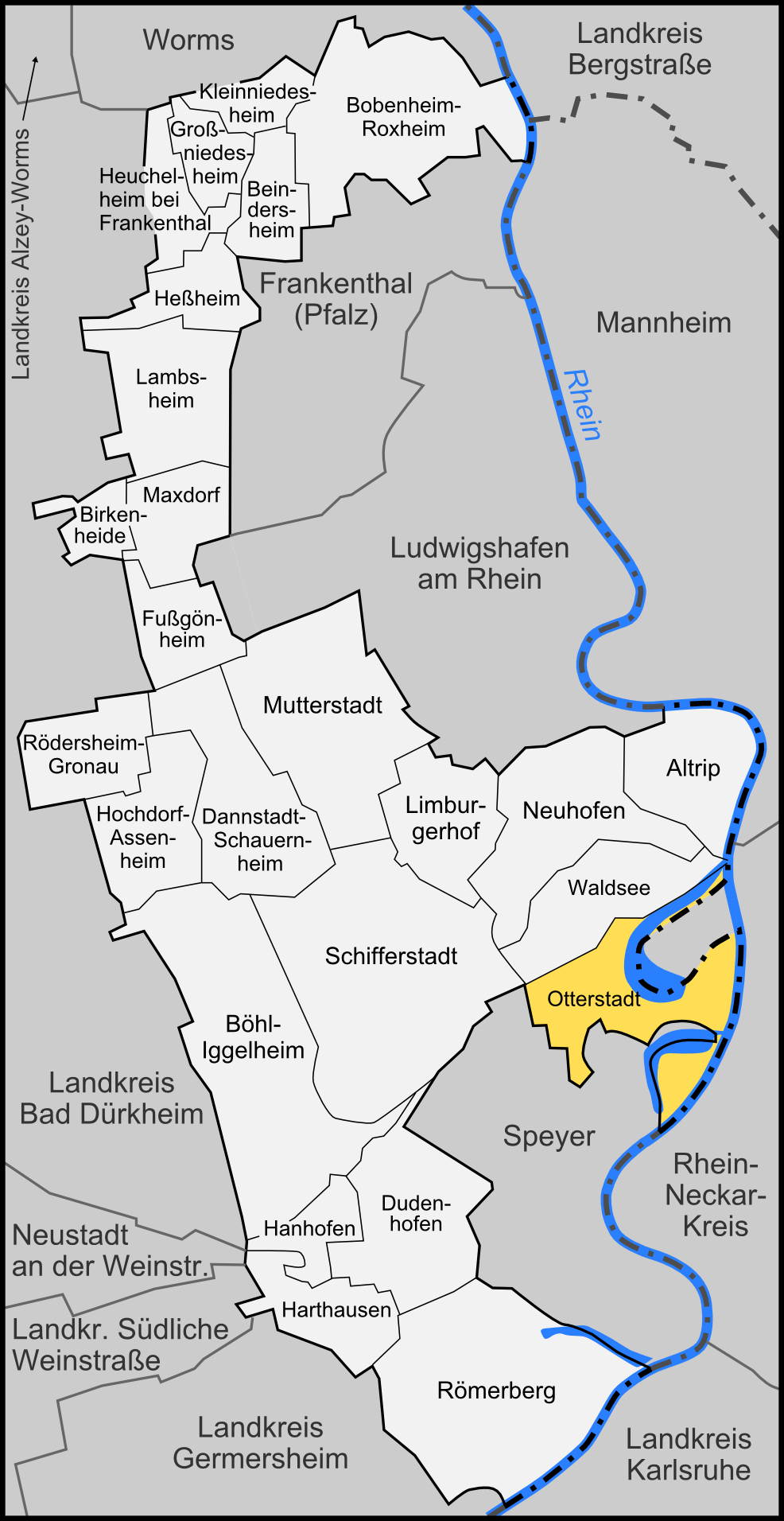 Karte der Gemeinde Otterstadt im Rhein-Pfalz-Kreis